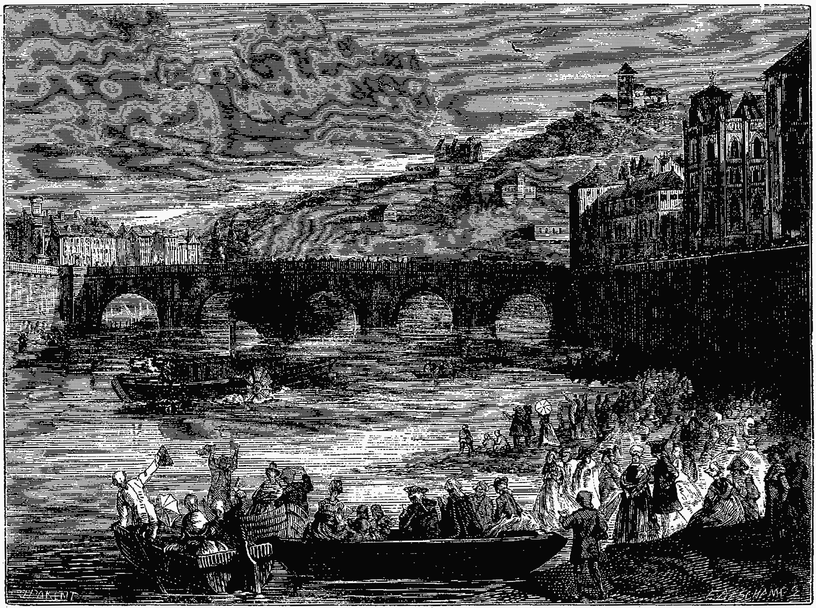 Expérience du marquis de Jouffroy faite sur la Saône à Lyon, le 15 juillet 1783